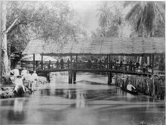 Foto. Brug over de Soengei (rivier) Pertjoet bij de kampong Temboeng op de tabaksonderneming Bandara Klippa van de Deli Maatschappij, Oost-Sumatra.